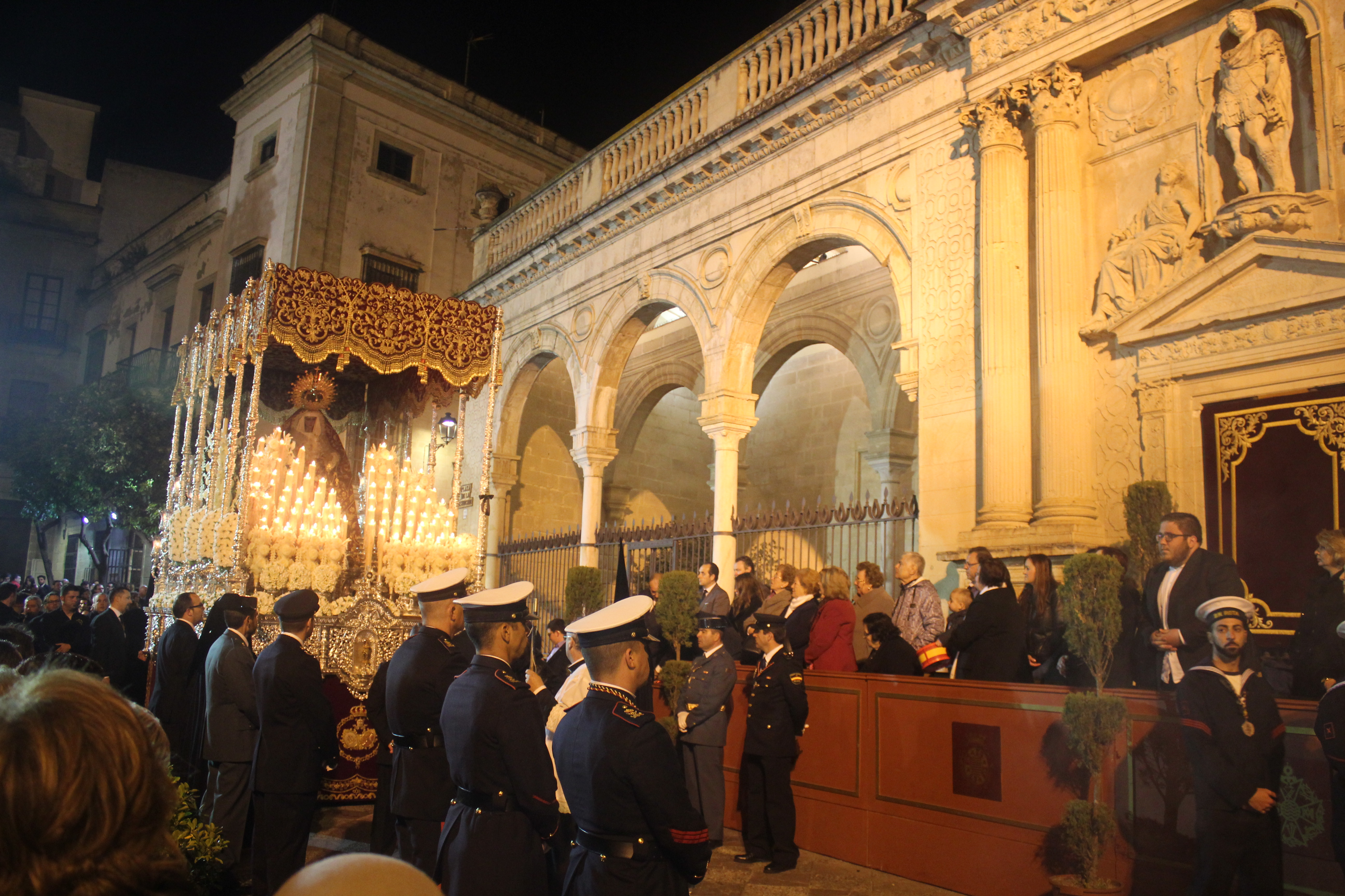 Hermandad de la Expiración procesionando en la Semana Santa de Jerez de la Frontera 2016 (Andalucía, España) This is a photography of a Folklore festival in Spain (Wikidata id Q6124533).